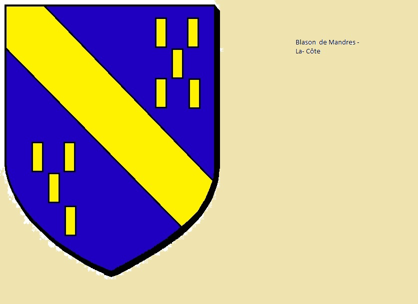 le blason de Mandres-La-Côte